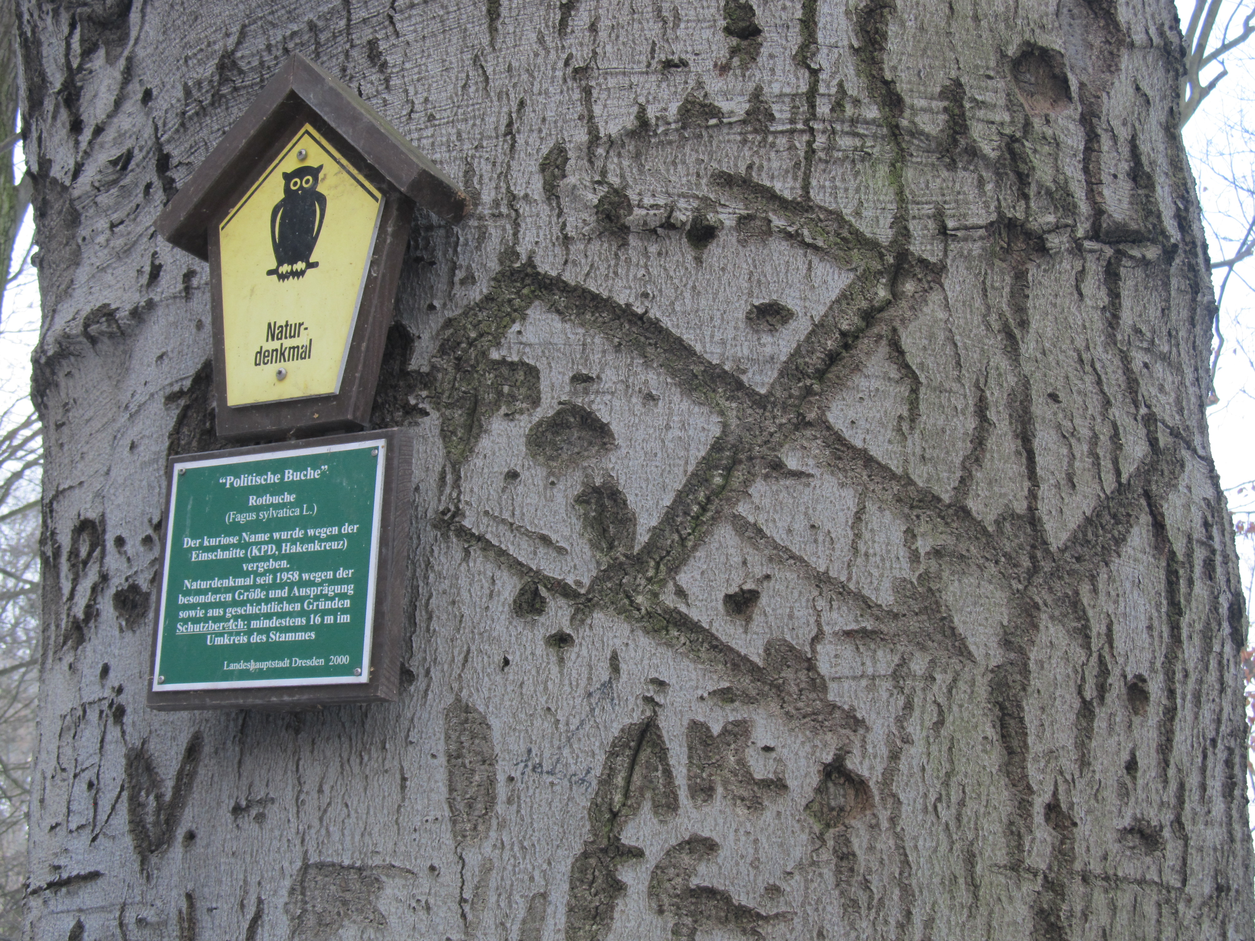 Politische Buche, Naturdenkmal im Kleditschgrund, Niederwartha, Dresden